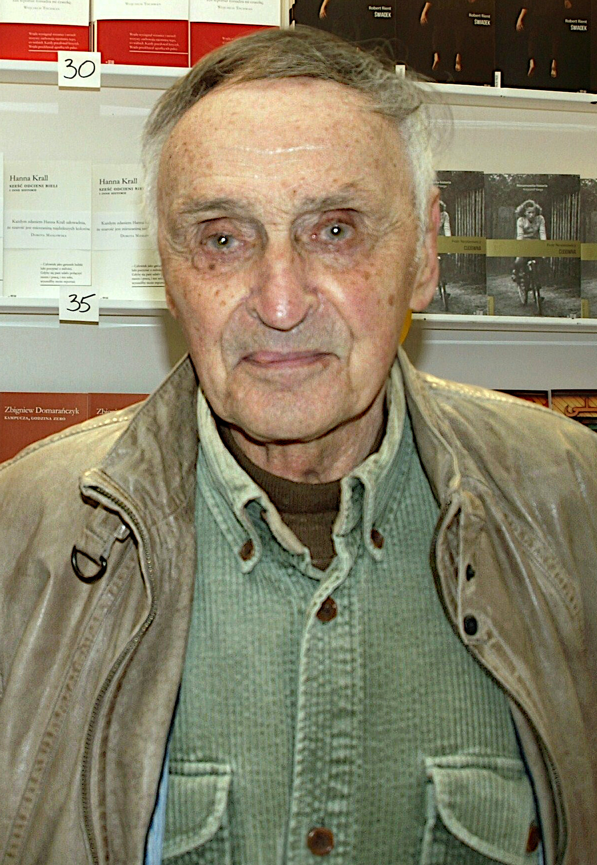 Andrzej Mularczyk (pisarz, scenarzysta filmowy, autor reportaży, twórca słuchowisk radiowych) podczas Warszawskich Targów Książki w 2015 r.